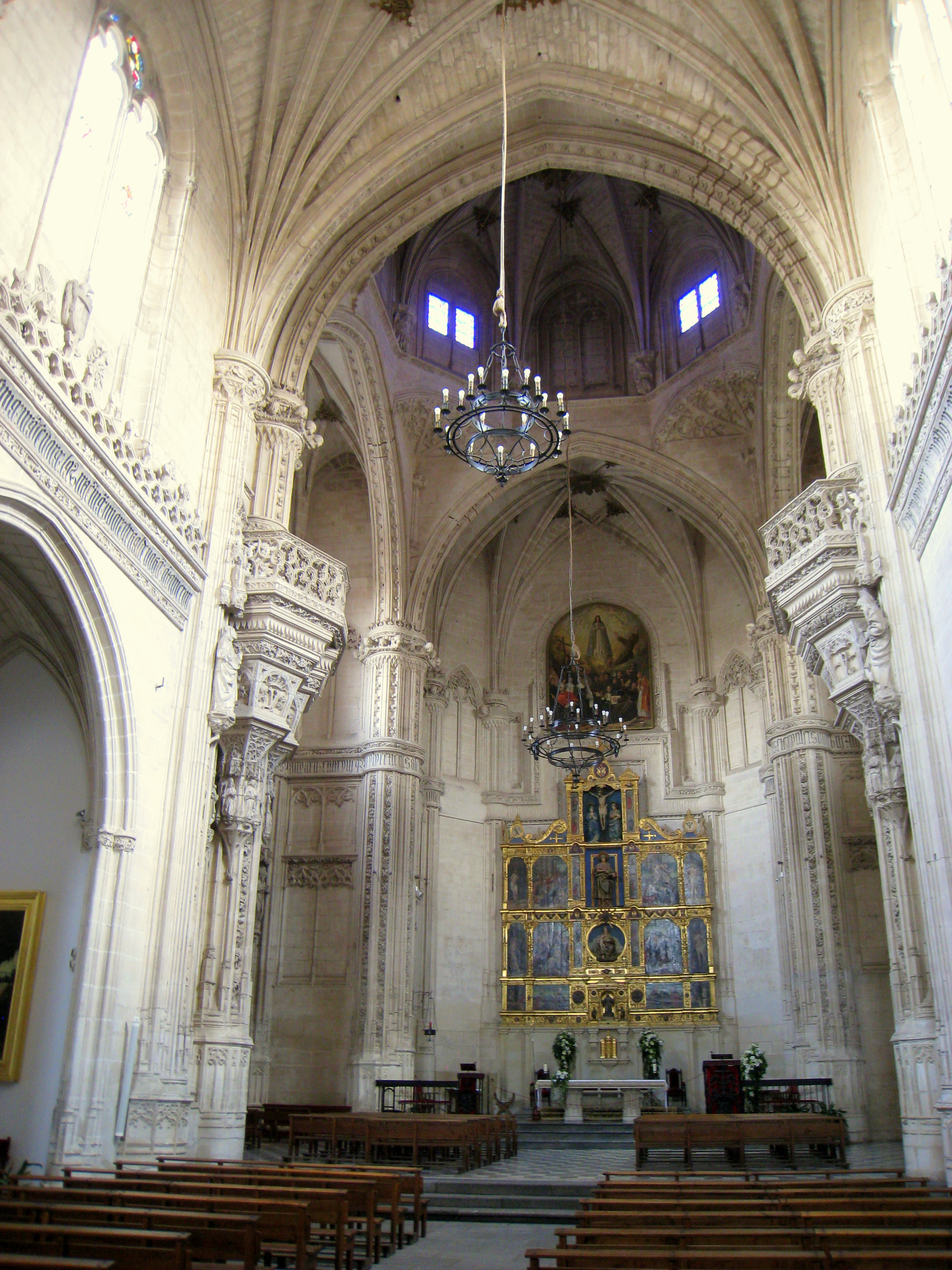 San Juan de los Reyes - Toledo, Spain.